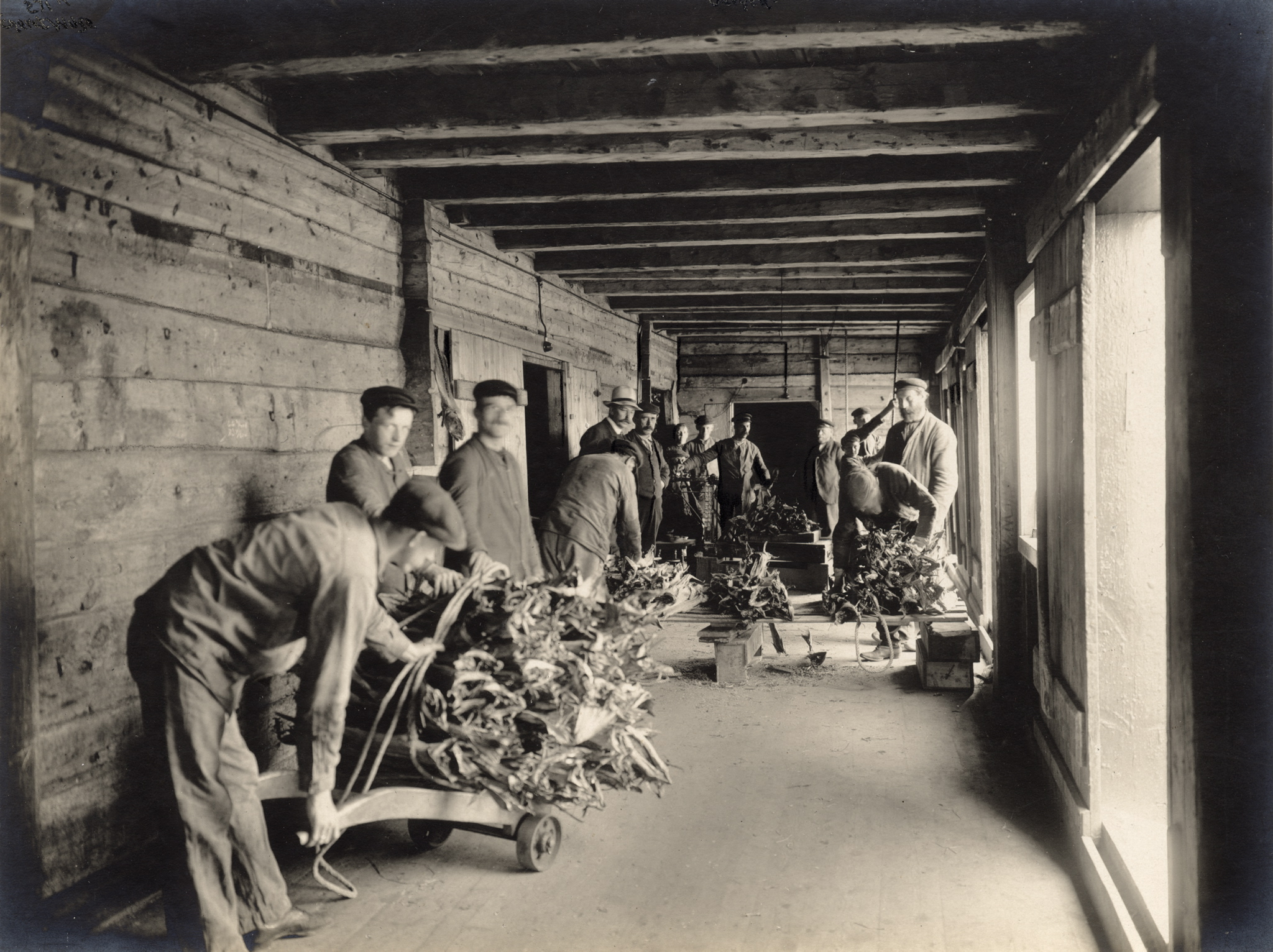 Bryggen Tyskebryggen Fotograf: Wilse, Anders Beer (1865-1949) Datering: Ca 1910 til 1920 Sted: Bergen Hordaland Se flere bilder på Kulturminnebilder